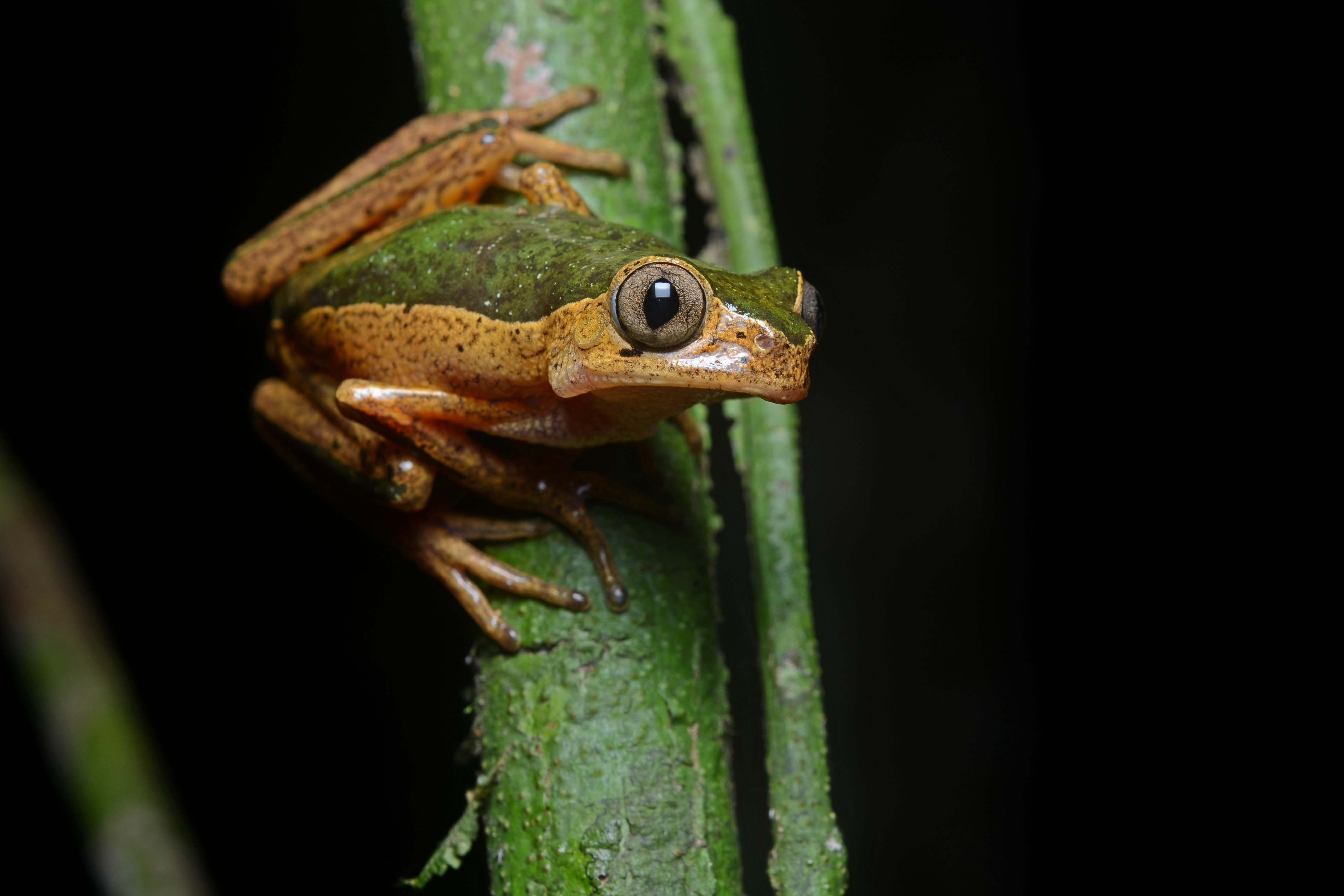 Hylidae: Phyllomedusa palliata Tambopata National Reserve